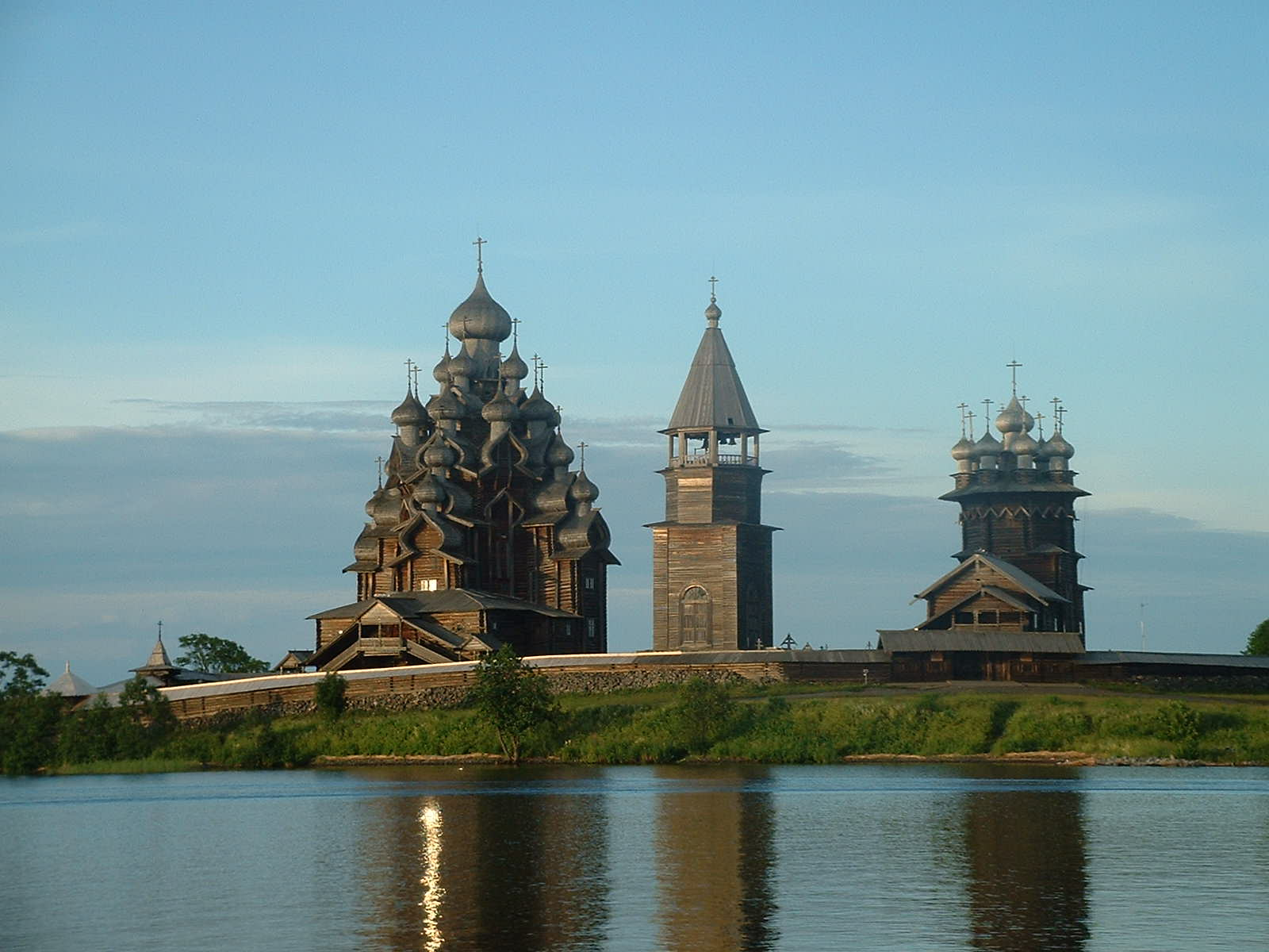 Преображенский собор, утро